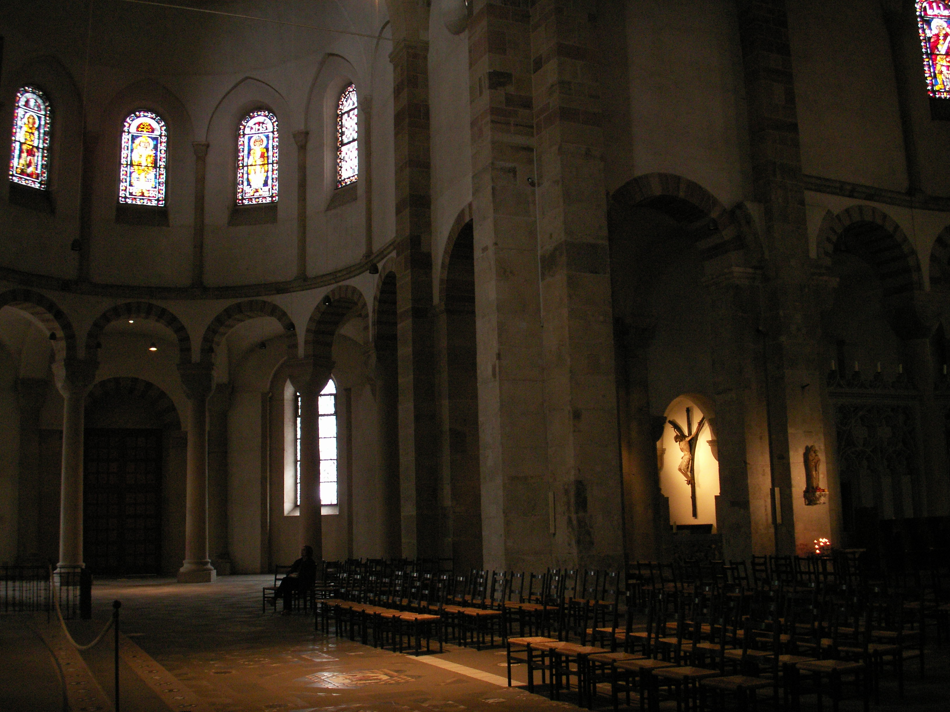 St. Maria im Kapitol, Köln, Inneres mit Pestkreuz